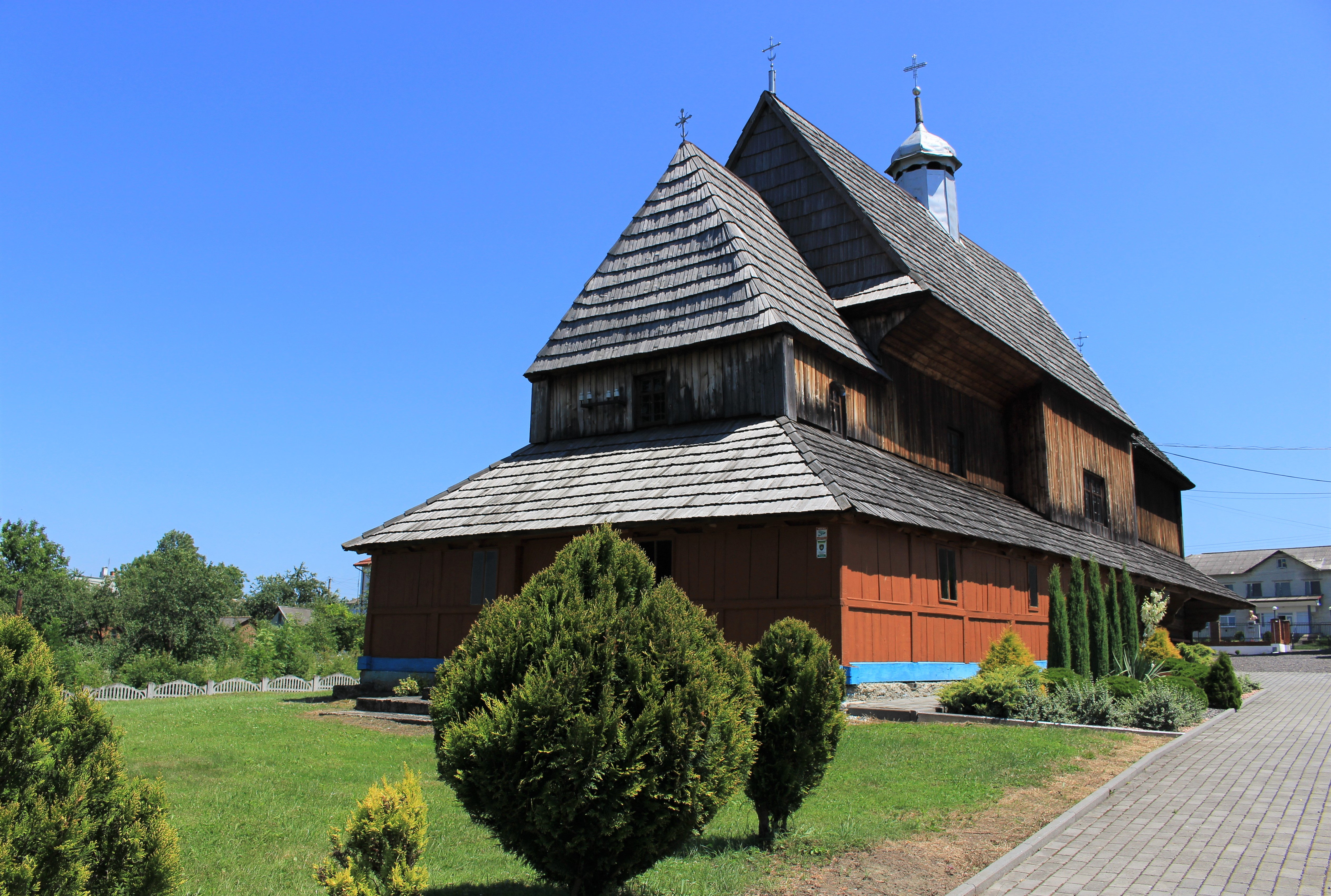 Церква Успіння Богородиці (Святої Параскеви), Меденичі